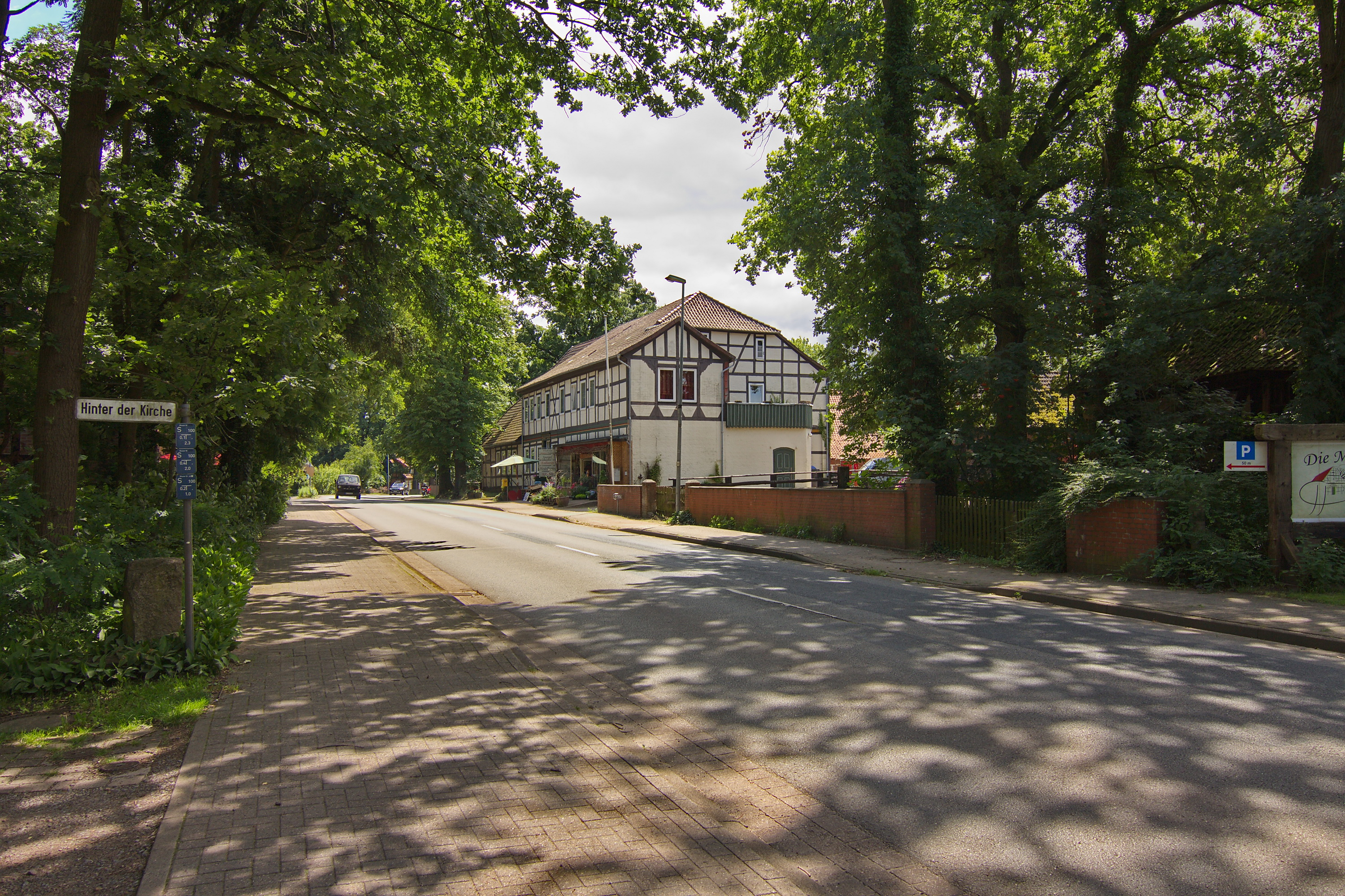 Ortsblick Eickeloh, Niedersachsen, Deutschland